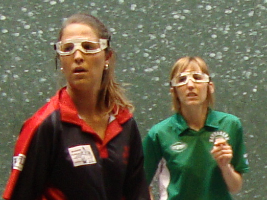 Complexe de pelote basque de Pau, frontenis, Equipement:lunettes protectrices. (Photo pris pendant le Championnat de France 2010, Femmes B.)